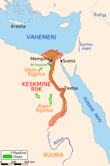 Ausdehnung des altes ägytischen Reiches (Mittleres Reich; in estnischer Sprache).